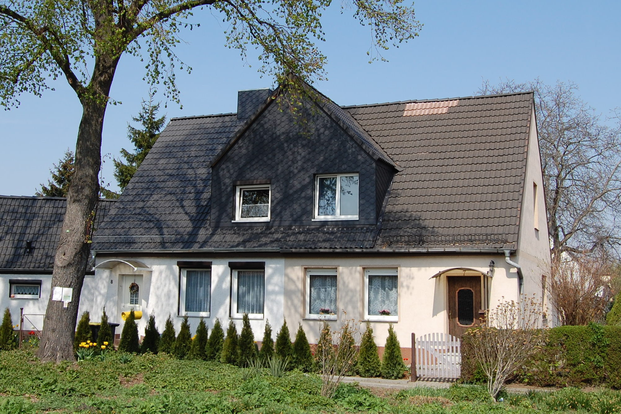 Haus Irenenplatz 7 in Magdeburg-Lüttgen-Salbke, Geburtshaus des Regisseurs Hans Joachim Hildebrandt